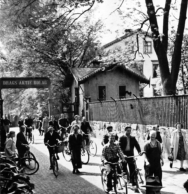 Drags, Norrköpings yllefabriksaktiebolag